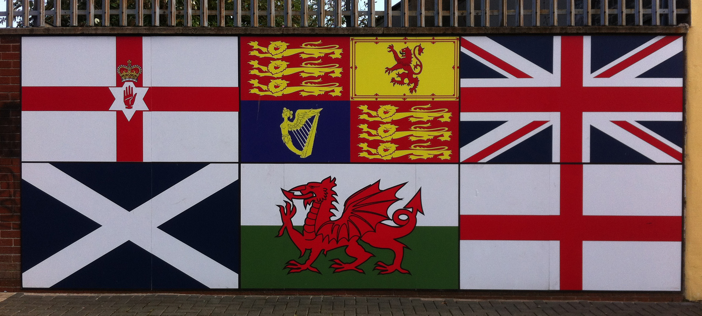 UK mural, Shankill